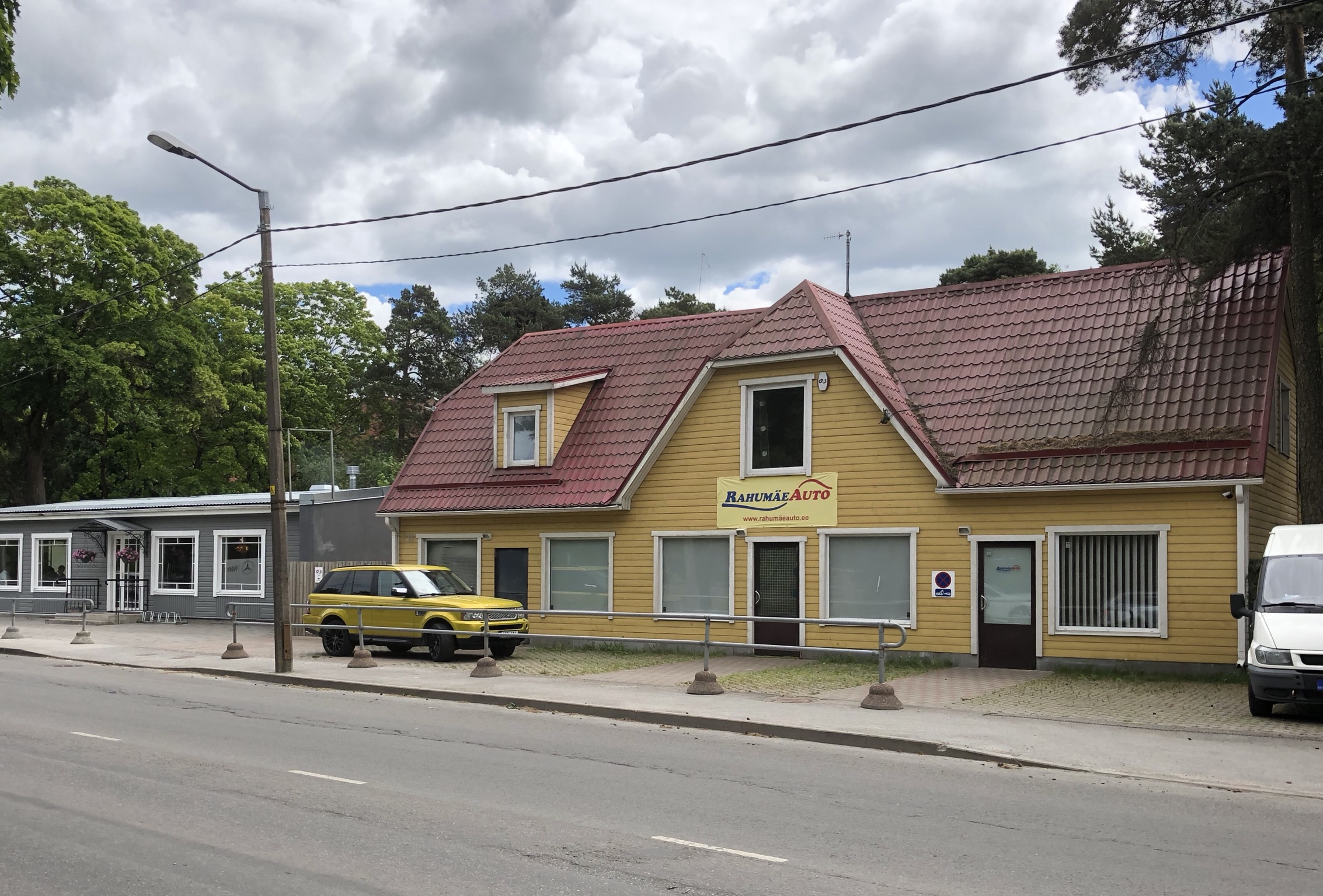 Pernausche Straße 221 in Nömme